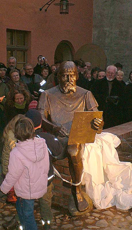 Feierliche Enthüllung und Einweihung des Lucas Cranach d. Ä.-Denkmals im Cranachhof der Lutherstadt Wittenberg am 27. November 2005